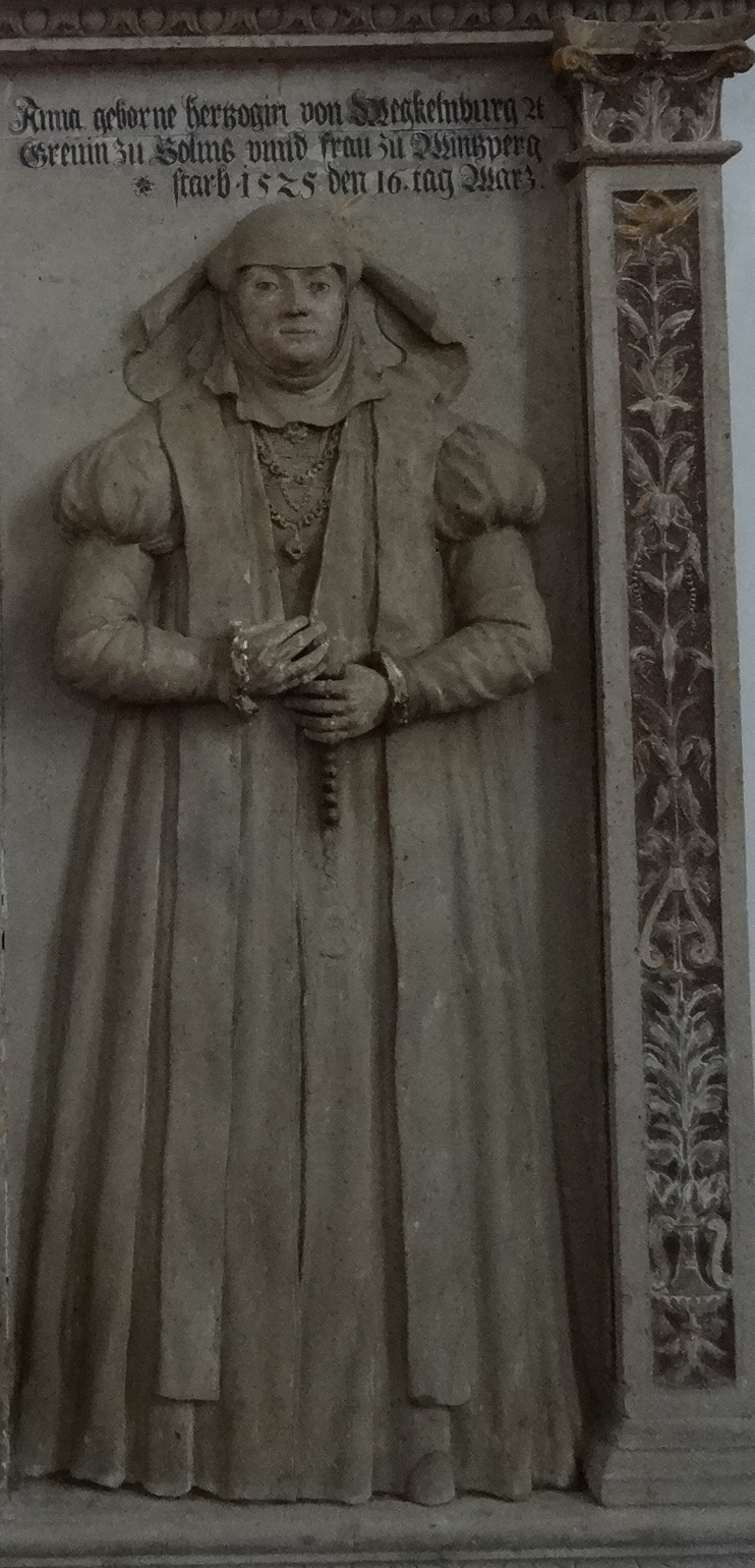 Anna, geborene Herzogin zu Mecklenburg, verwitwete Gräfin zu Solms-Lich, gestorben am 16. März 1525, Marienstiftskirche Lich